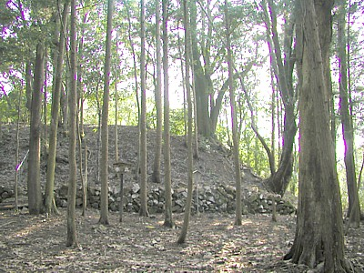 Goryu castle in Akitakata, Hiroshima, Japan